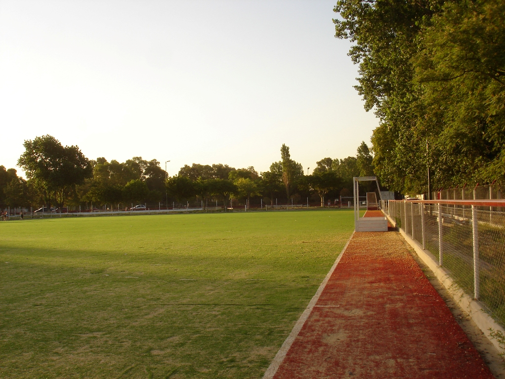 Cacha del campo de deportes Jorge Newbery